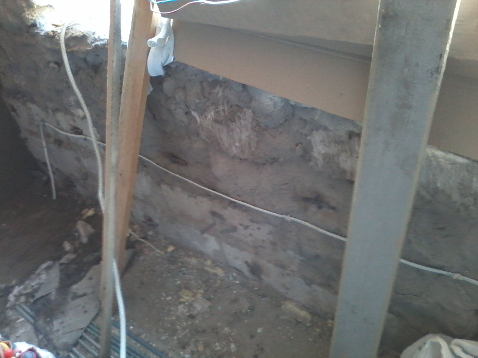 Будівництво дачі